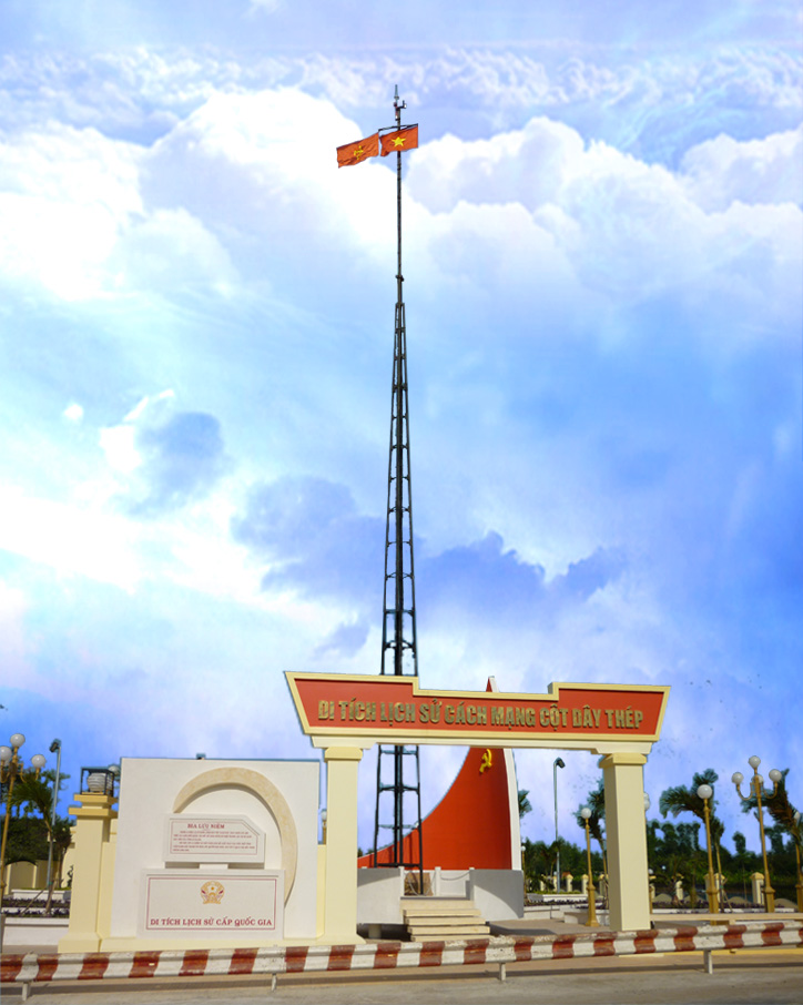 Cột dây thép (huyện Chợ Mới, tỉnh An Giang).